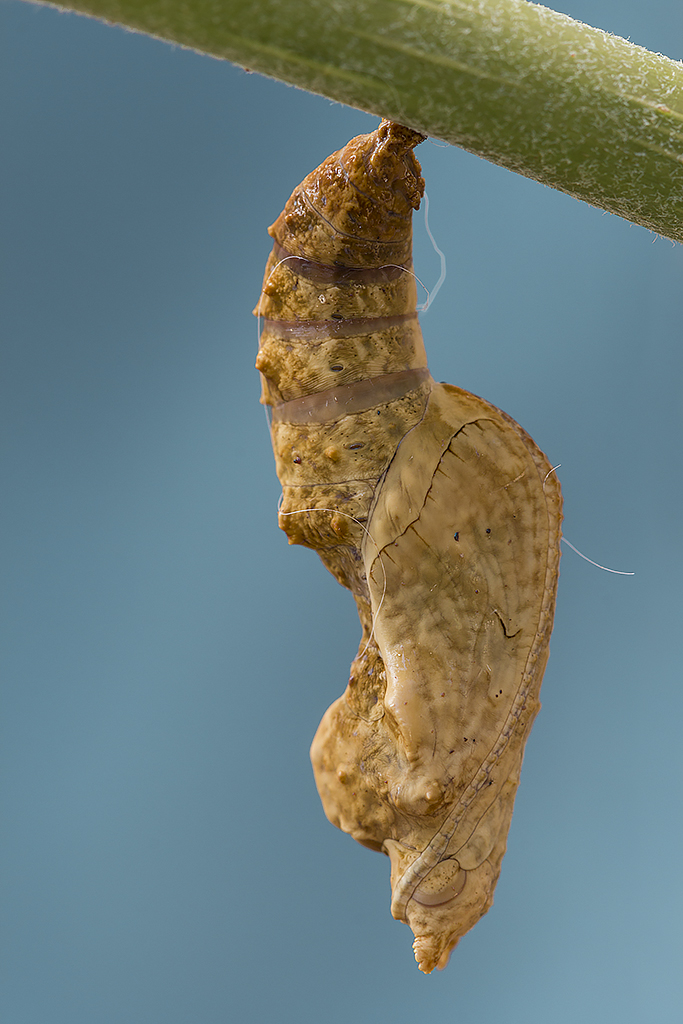 Local: Araçatuba/SP - Brasil Bioma: Mata Atlântica Acessórios: Tripé + Trilho Foco Macro + Cabo Disparador Remoto